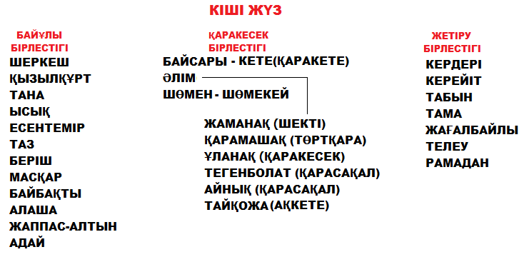 КІШІ ЖҮЗ